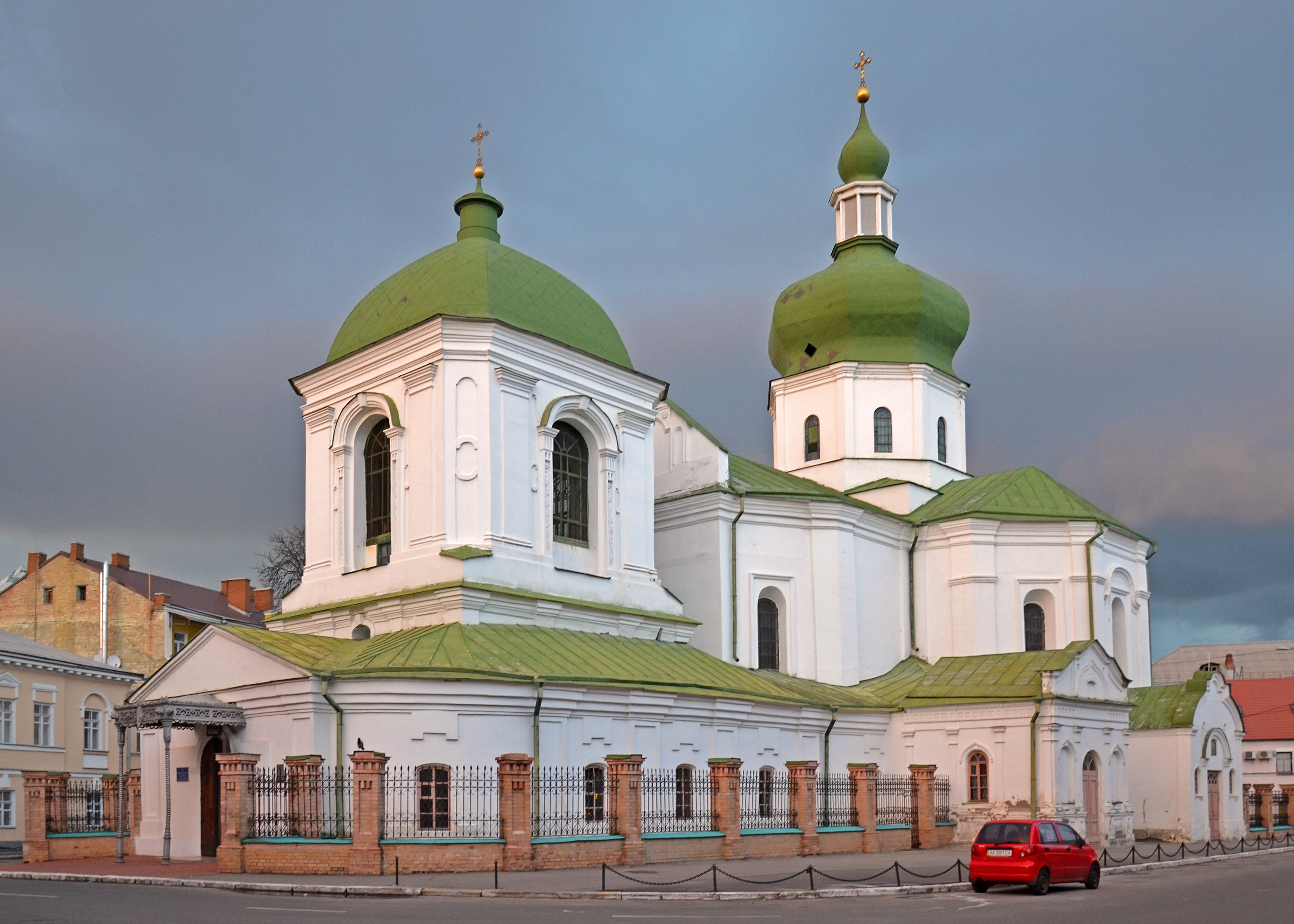 Церква Притисько-Микільська, Київ, Хорива вул., 5-а